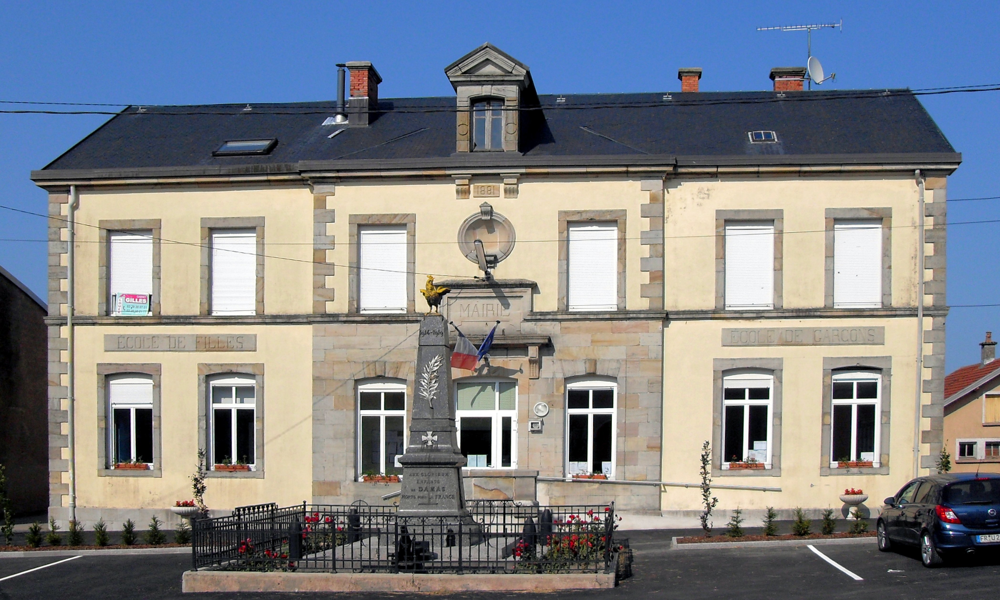 La mairie de Damas-aux-Bois